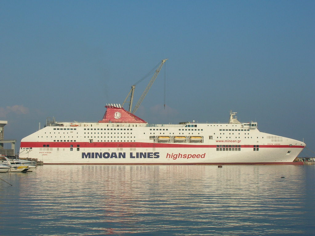 La Cruise Europa nel porto di Castellammare di Stabia